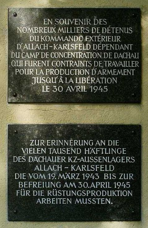 Gedenktafel für die KZ-Opfer von Ludwigsfeld